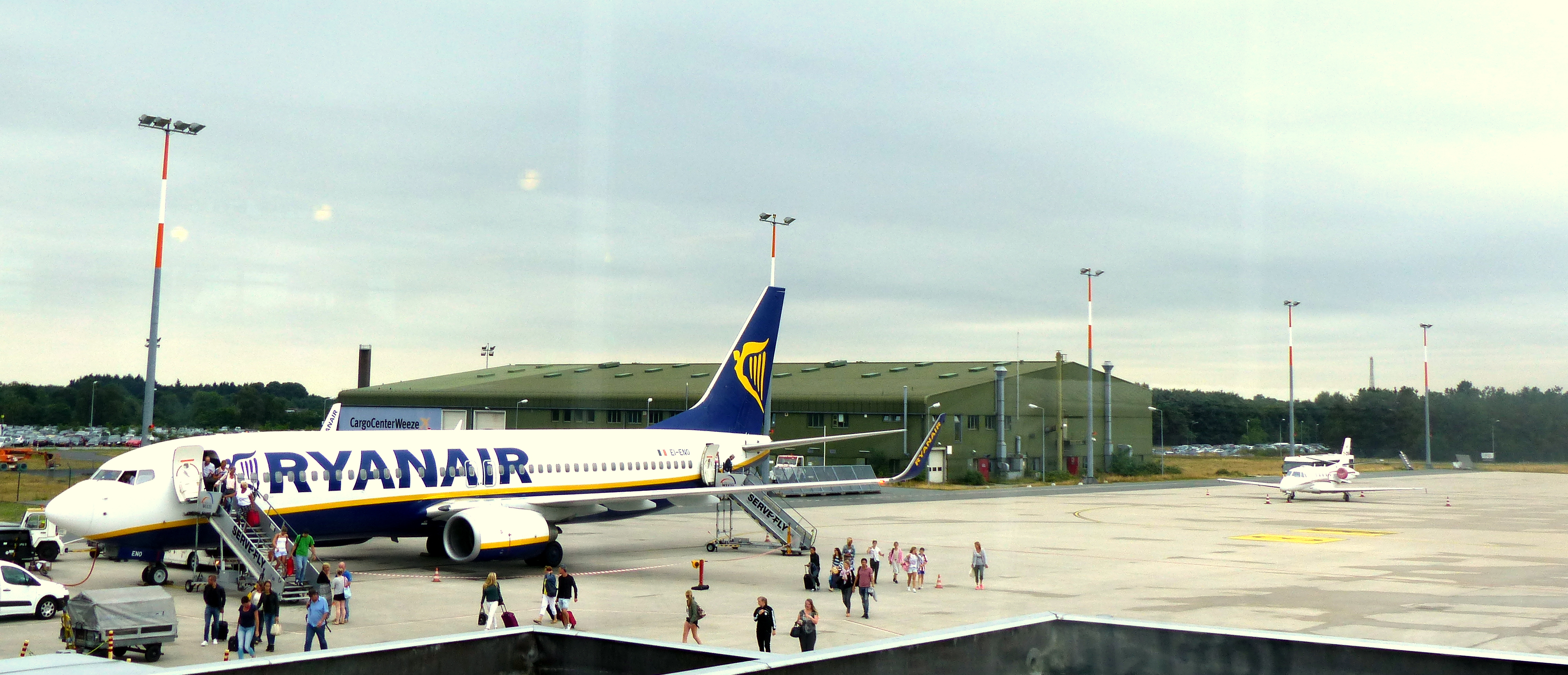 Airport Weeze